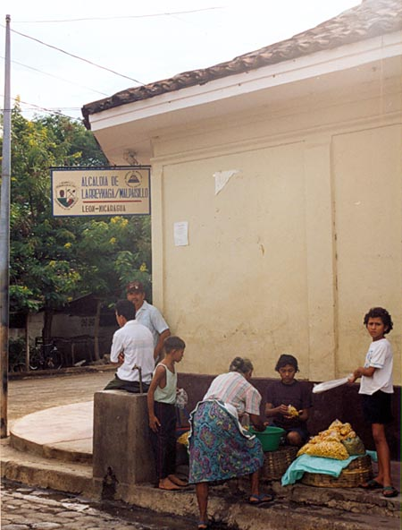 Calles del centro de Malpaisillo (Nicaragua)